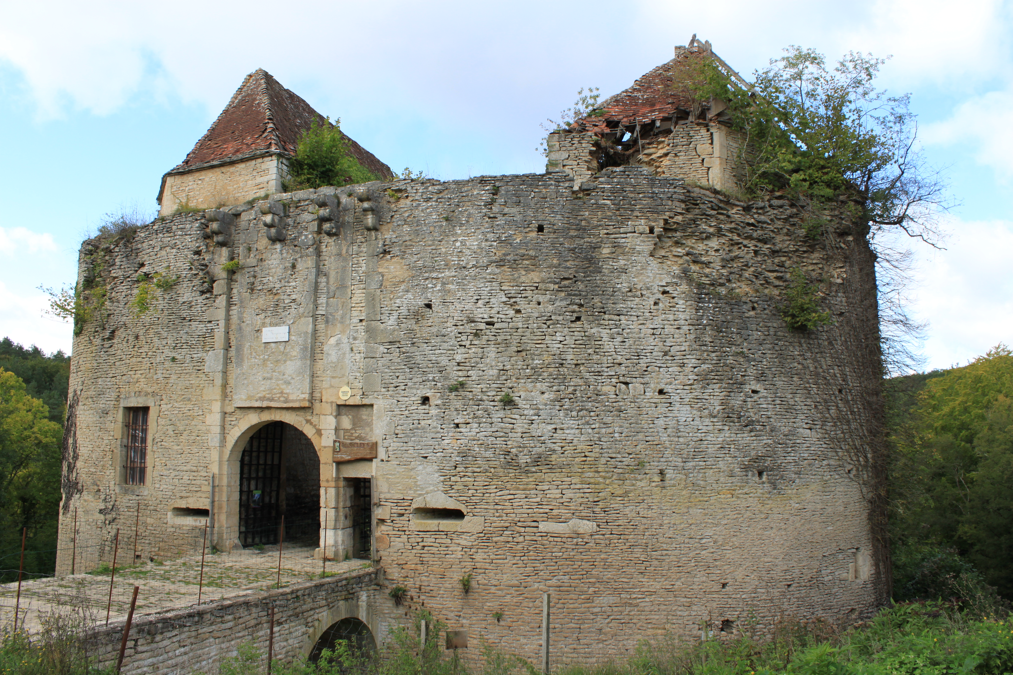 Chateau de Rochefort, Asnières-en-Montagne, Côte-d'Or, Bourgogne, FRANCE